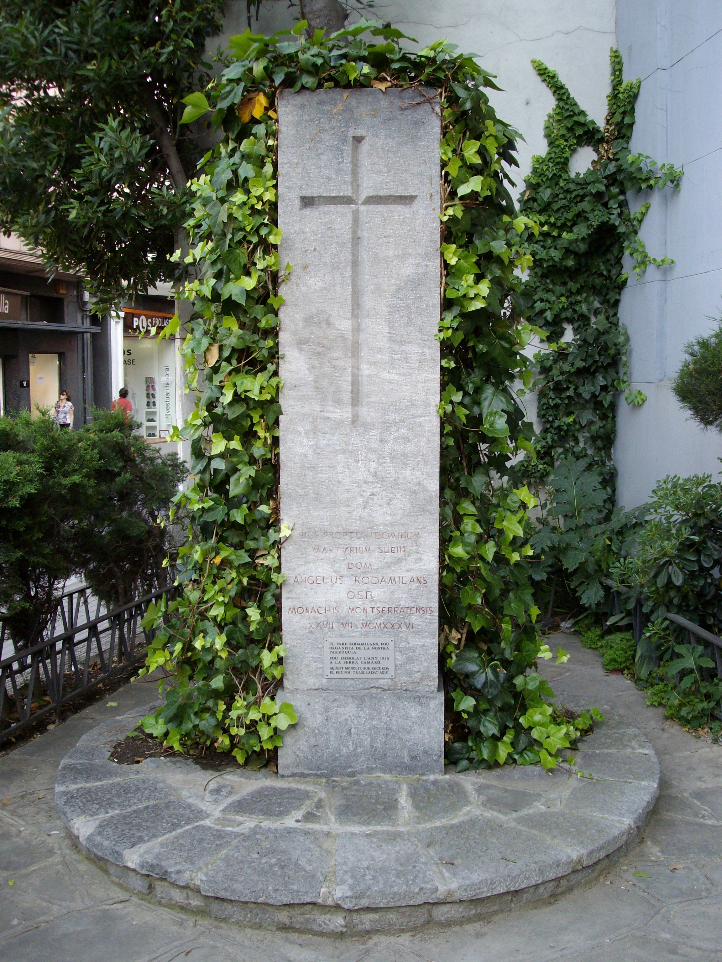 Monumento al Padre Rodamilans, erigido en 1956 en la Vía Massagué, al lado de la iglesia de la Purísima Concepción de Sabadell.